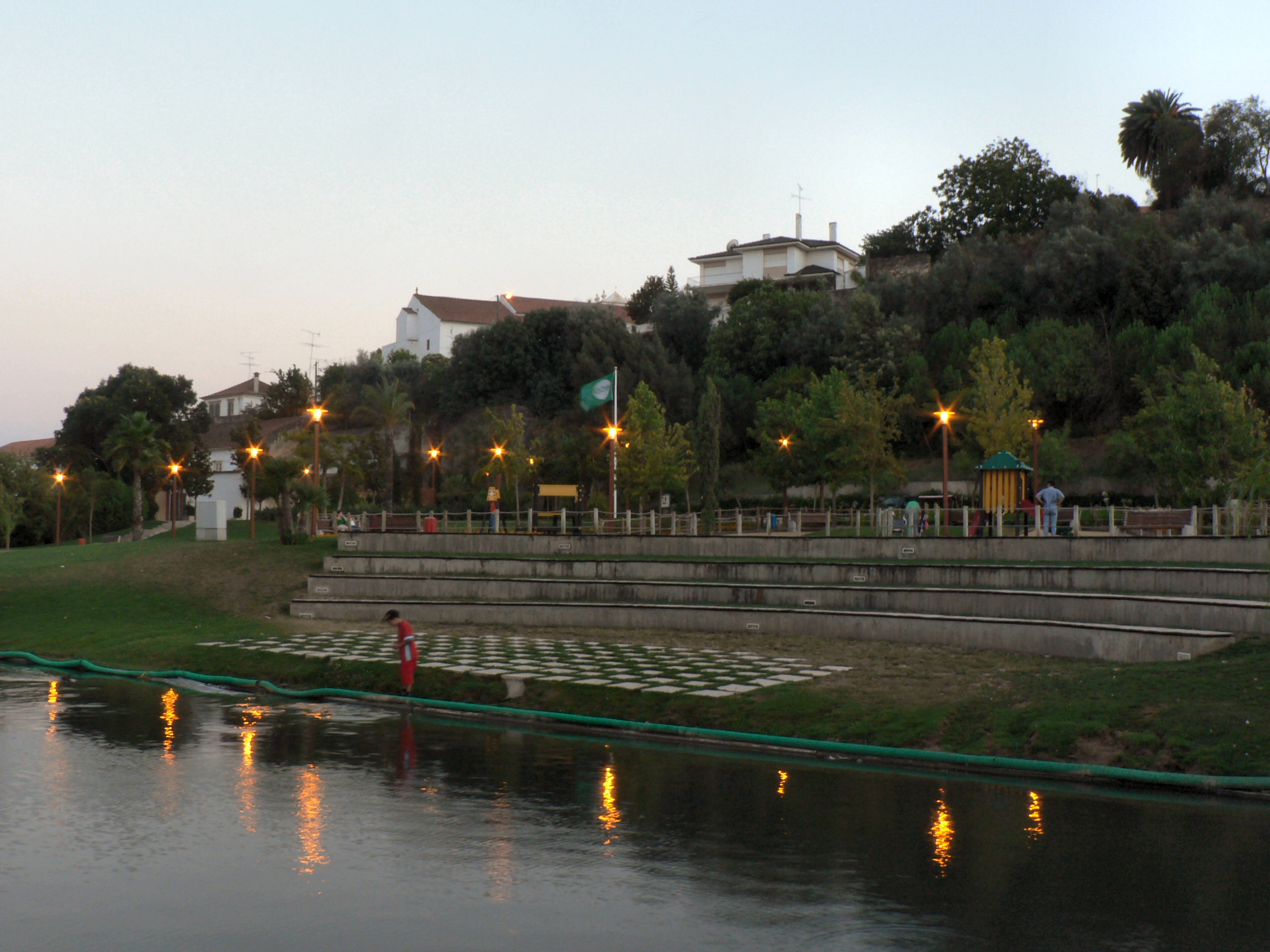 Jardim das rosa em Torres Novas